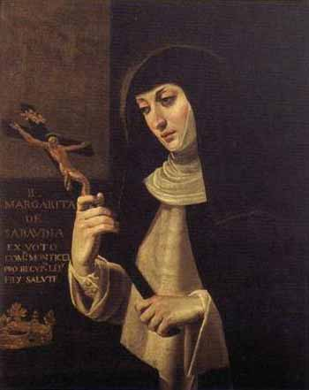 Портрет блаженной Маргариты Савойской